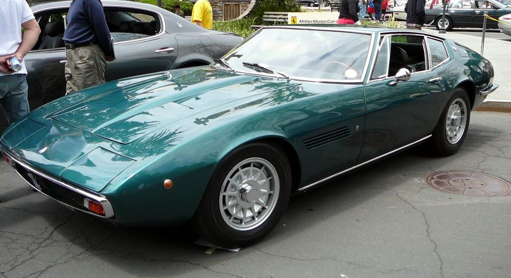 Maserati Ghibli.